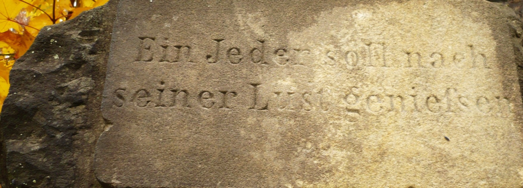 Sokołowsko - sentencja w języku niemieckim na ujęciu źródła leśnego / pomnik Leśne Źródełko (Waldquelle. Ein Jeder soll nach seiner Lust geniefsen )